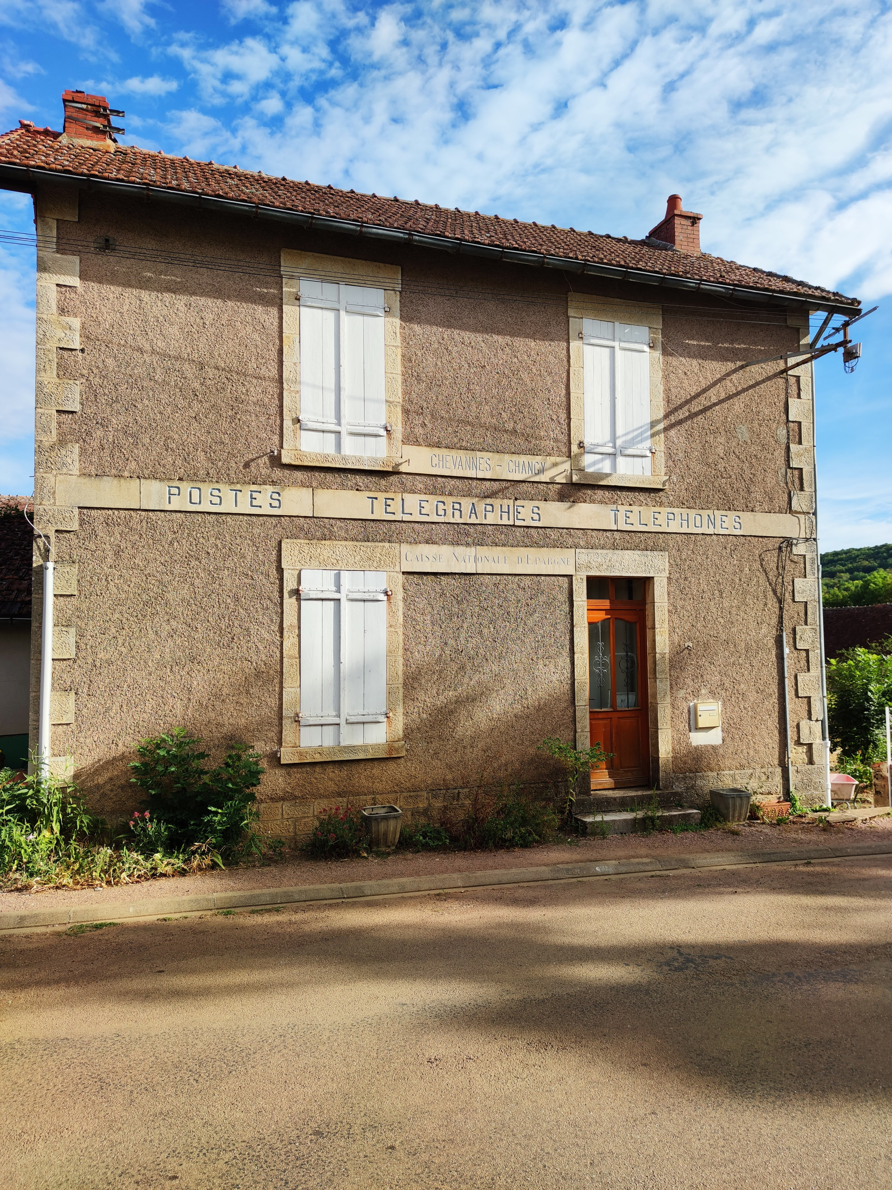 Ancienne poste de Chevannes-Changy (58).